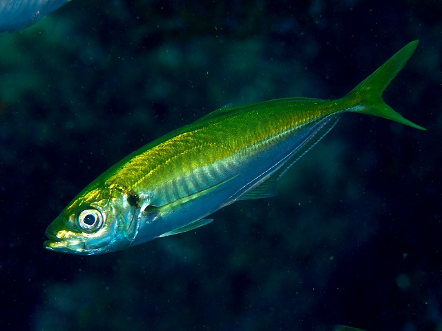 マアジ(Trachurus japonicus)